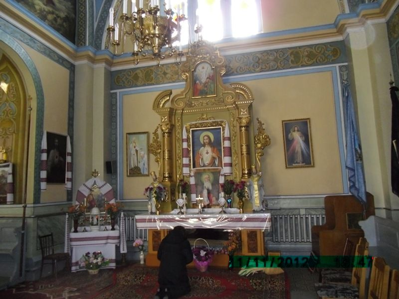 Stryj. Kościół Zwiastowania Najświętszej Maryi Panny, gdzie są przechowywane szczątki błogosławionego Kościoła katolickiego Jozafata Kocylowskiego.